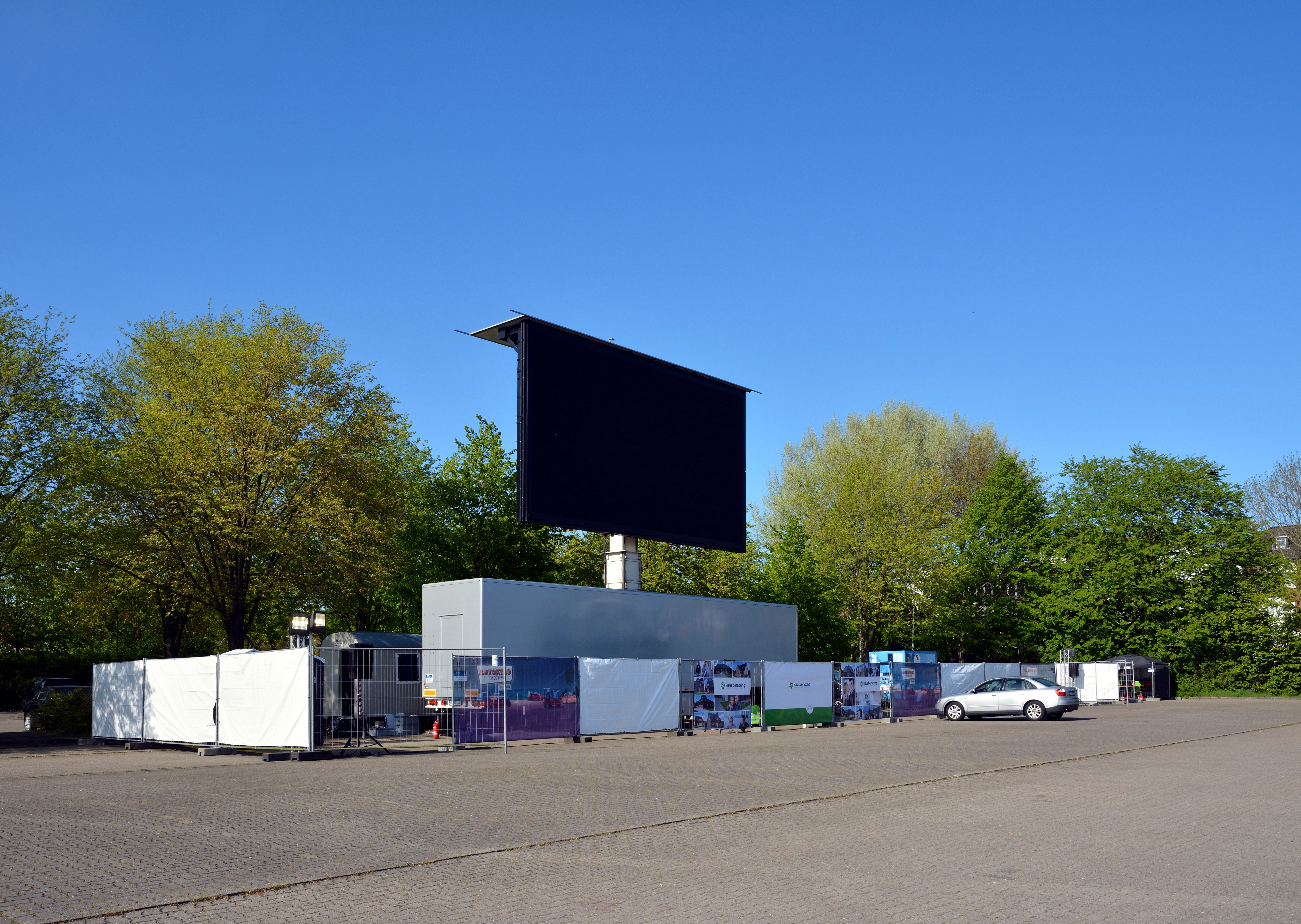 Auf den Malzmüllerwiesen wurde im Mai 2020 ein temporäres Autokino eröffnet. Autokino: Leinwand